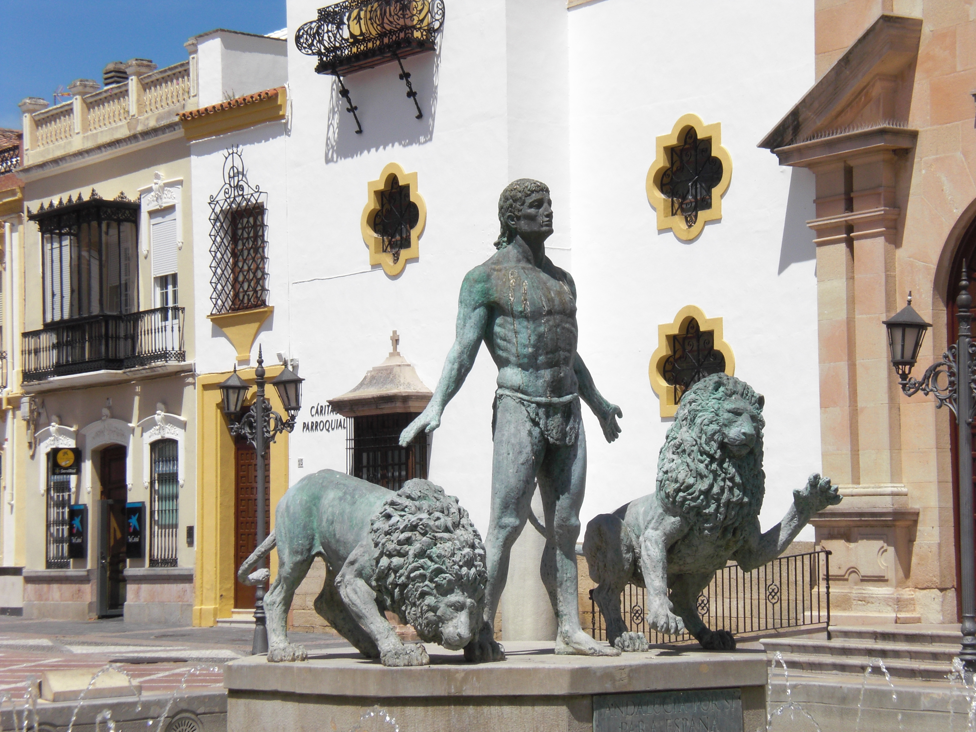 Ĉefa bildo de la blazono de Andaluzio ĉe fontano de Arundo sur placo ĉe kiu estas la konstruaĵo kie kunvenis la Asembleo de Arundo.